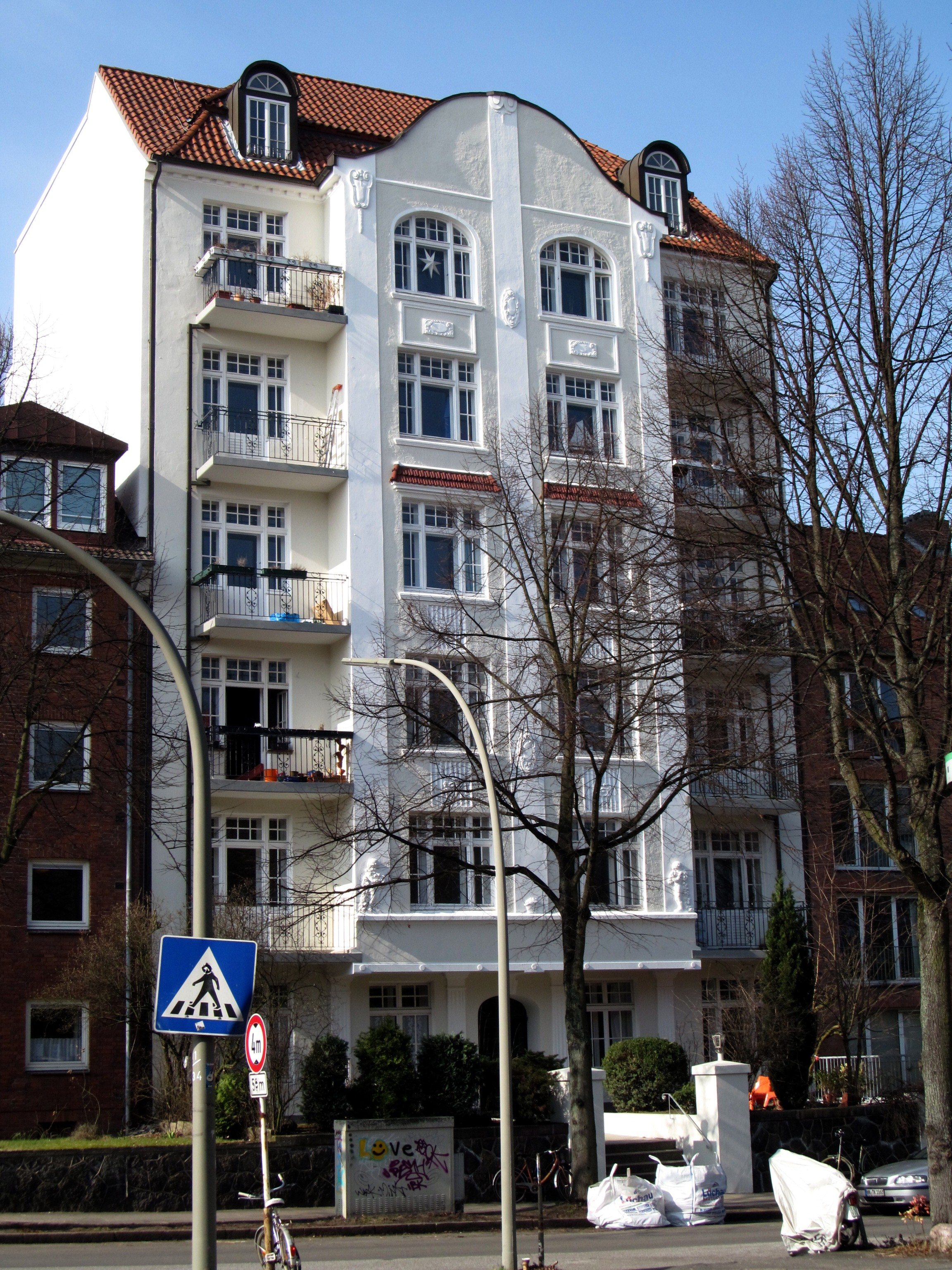 Denkmalgeschütztes Wohnhaus Hirschgraben 58 in Hamburg-Hamm, erbaut um 1905 This is a photograph of an architectural monument.